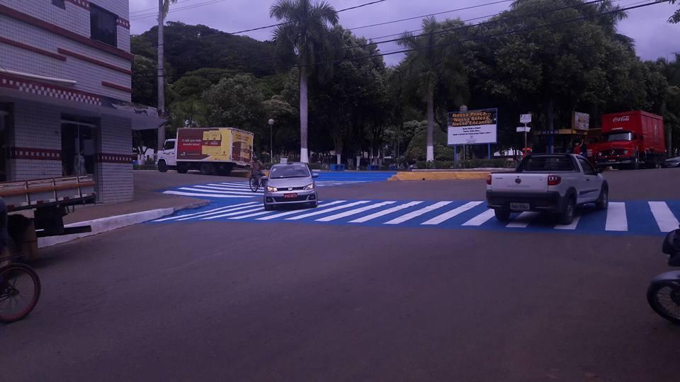 Orgulho de Viver Aqui